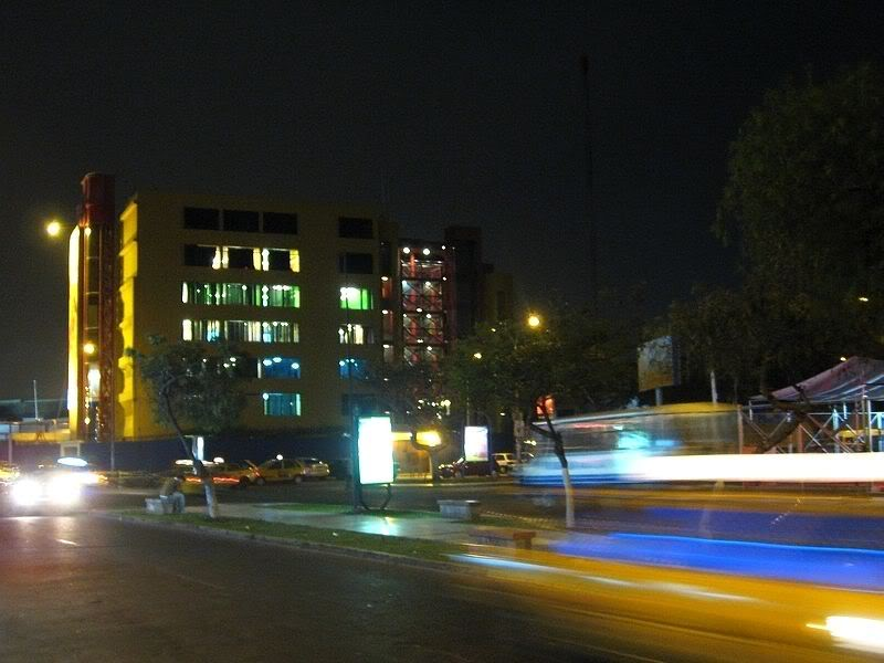 Toma nocturna de la avenida Húsares de Junin en la ciudad de Trujillo (Perú)